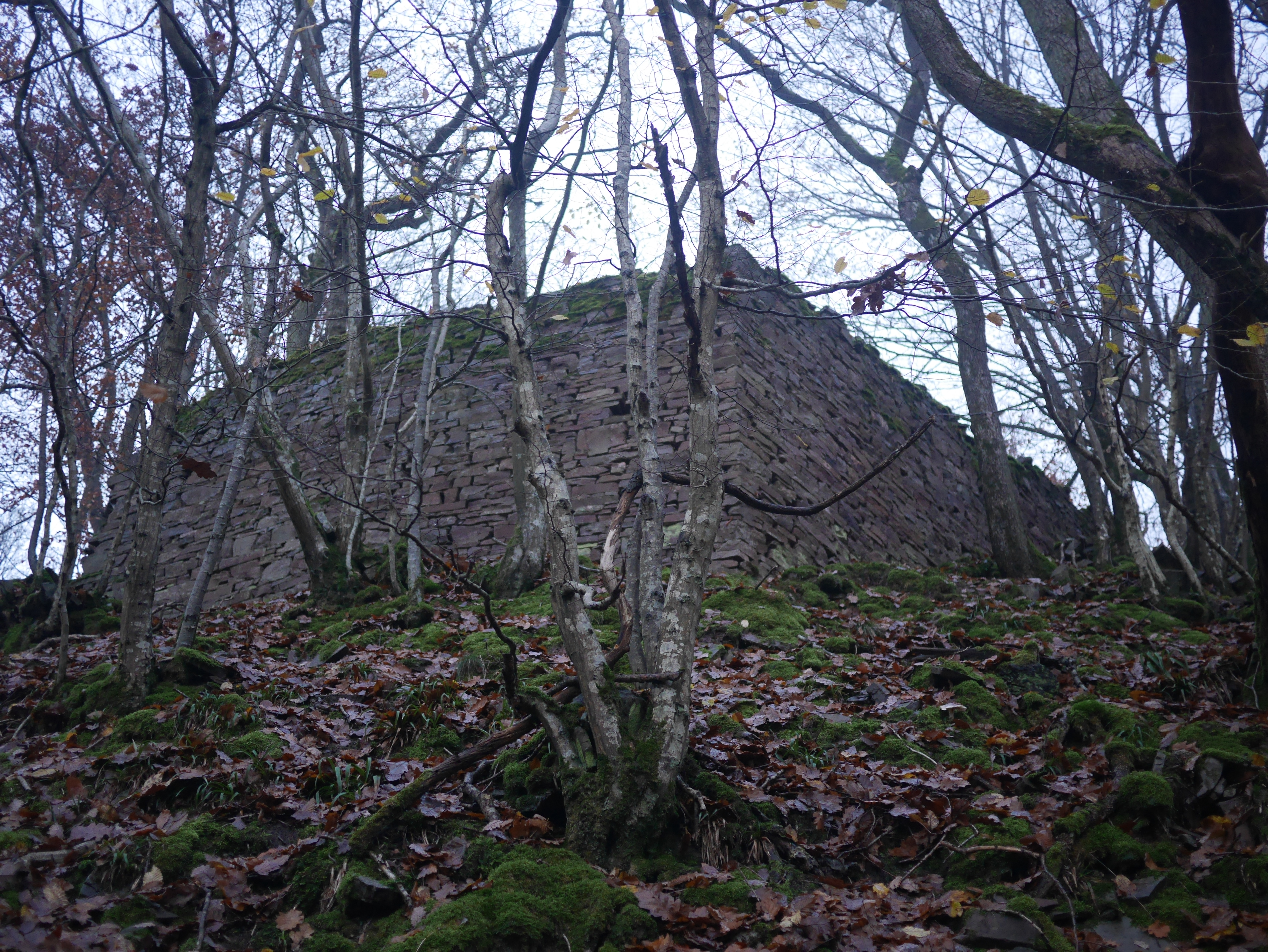 Ruine Heideburg nahe Alf/Mosel